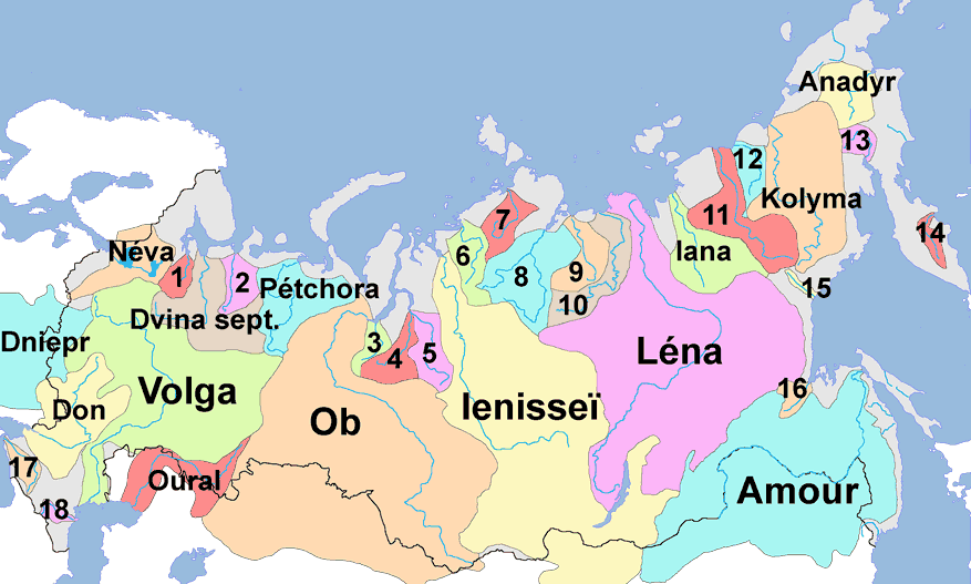 Carte des principaux bassins fluviaux de la Russie